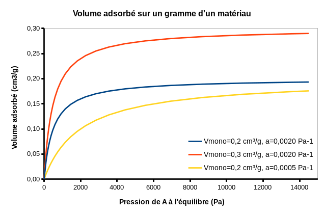 Influence de l'affinité a {\displaystyle a} et du volume de la monocouche V m o n o {\displaystyle V_{mono sur le volume adsorbé.